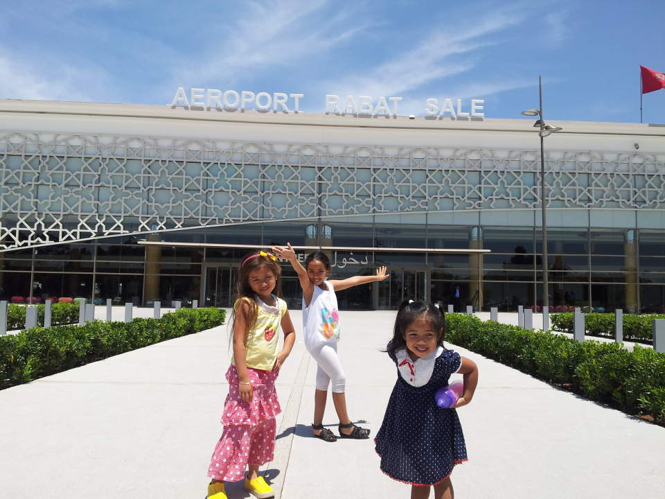 Aéroport de Rabat Maroc